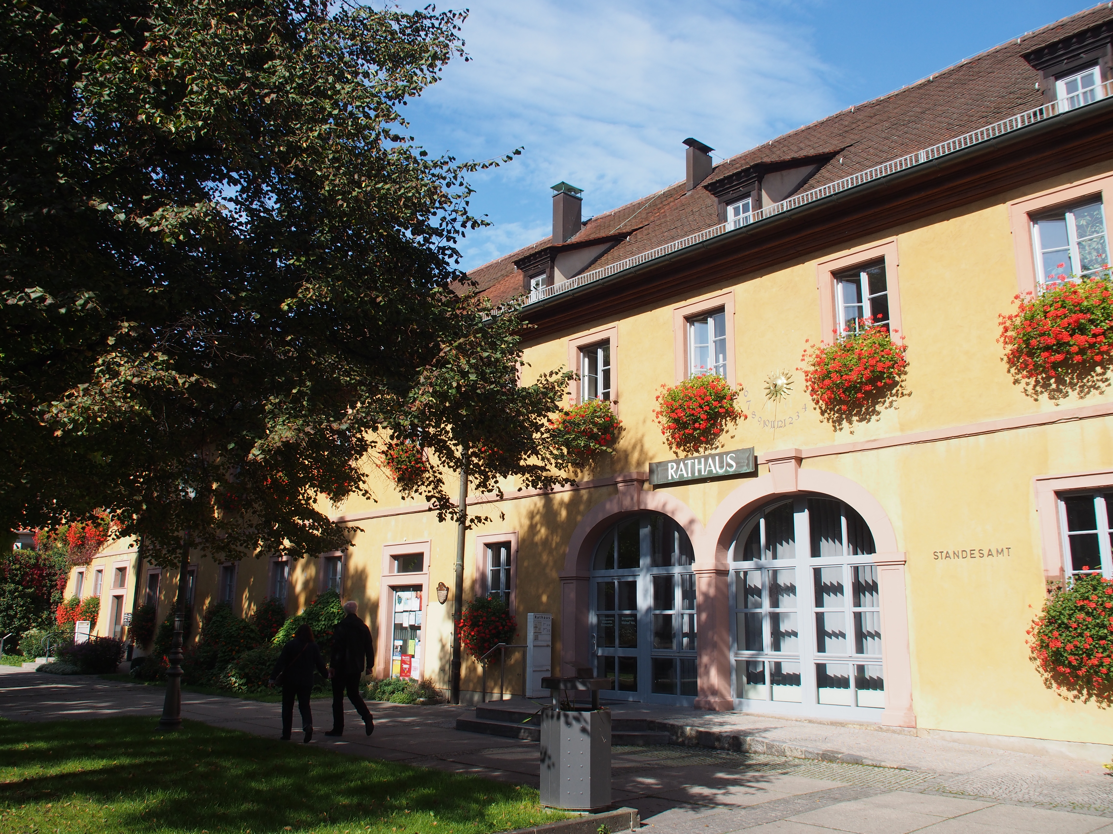 Rathaus in Veitshöchheim - 1748 erbaut nach Plänen von Balthasar Neumann, unter Fürstbischof Anselm Franz v. Ingelheim und Carl Philipp v. Greiffenclau. von 1902-1967 nutzte die Staatliche Lehranstalt für Wein- Obst- und Gartenbau das Gebäude.